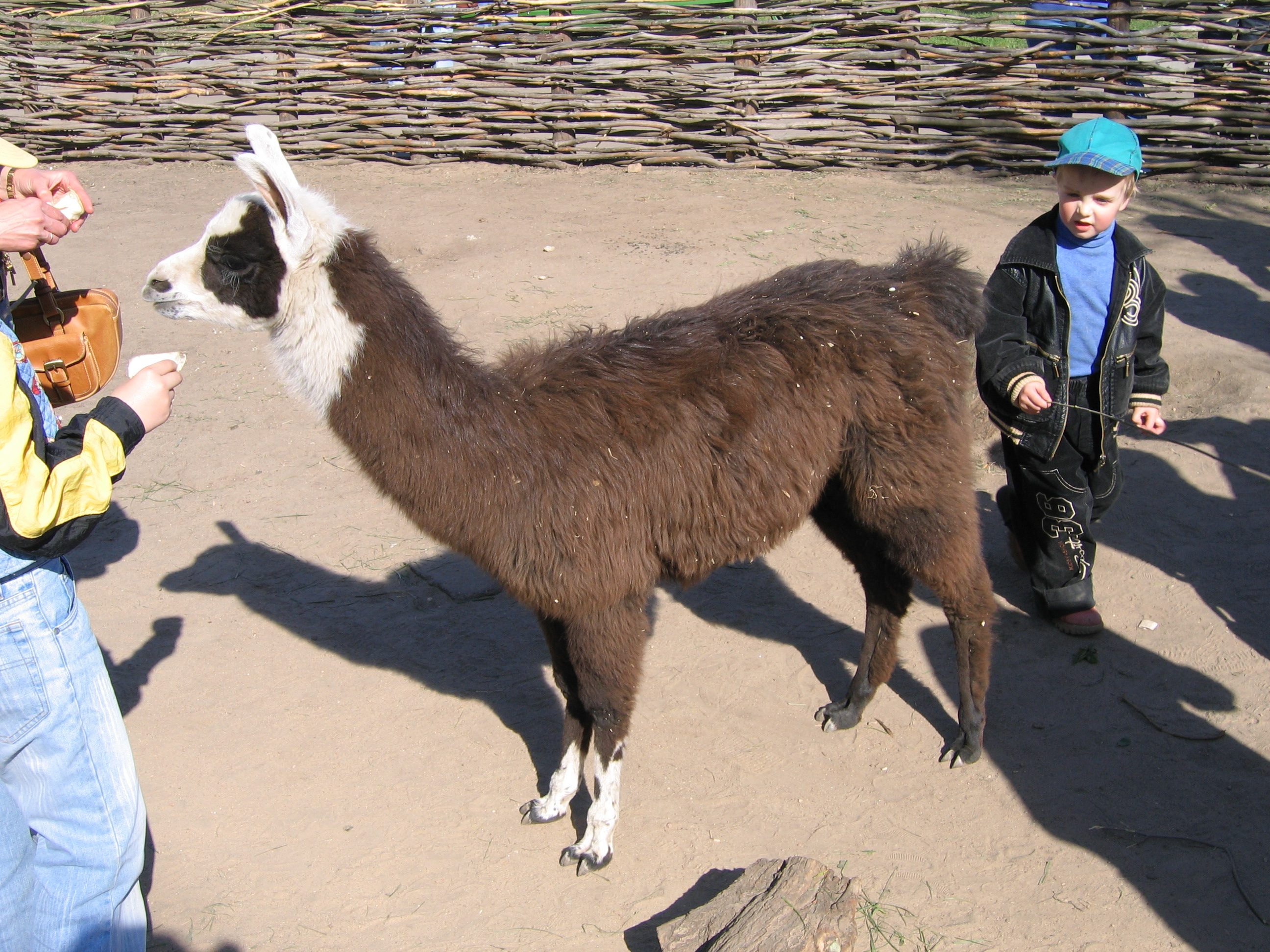 Zoo in Minsk, Belarus